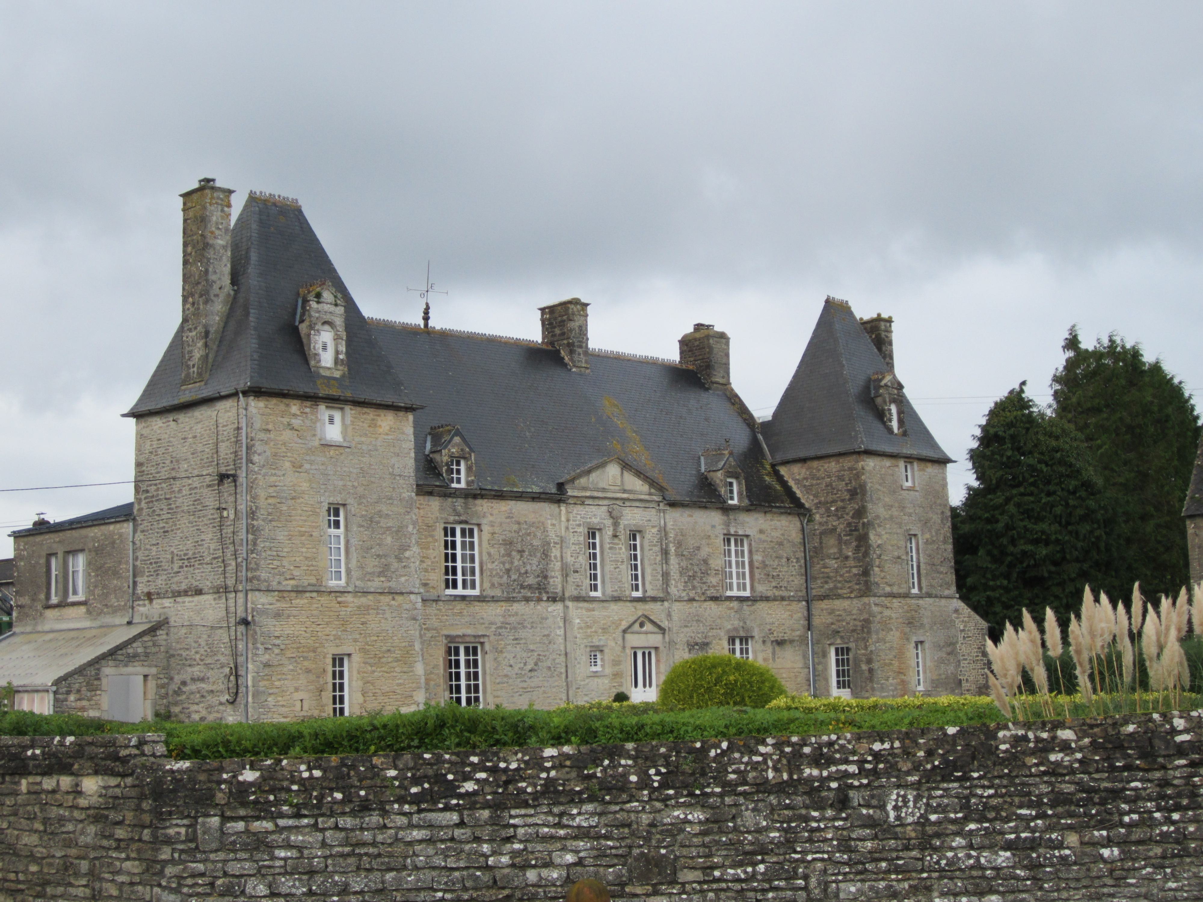 Château de Mesnildot, Le Ham (Manche)